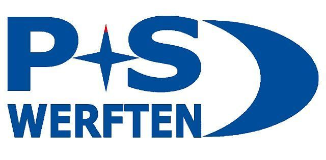 Logo der P+S Werften in Deutshcland. 2010 gegründet durch die Verschmelzung der Volkswerft Stralsund GmbH und der Peene-Werft GmbH.